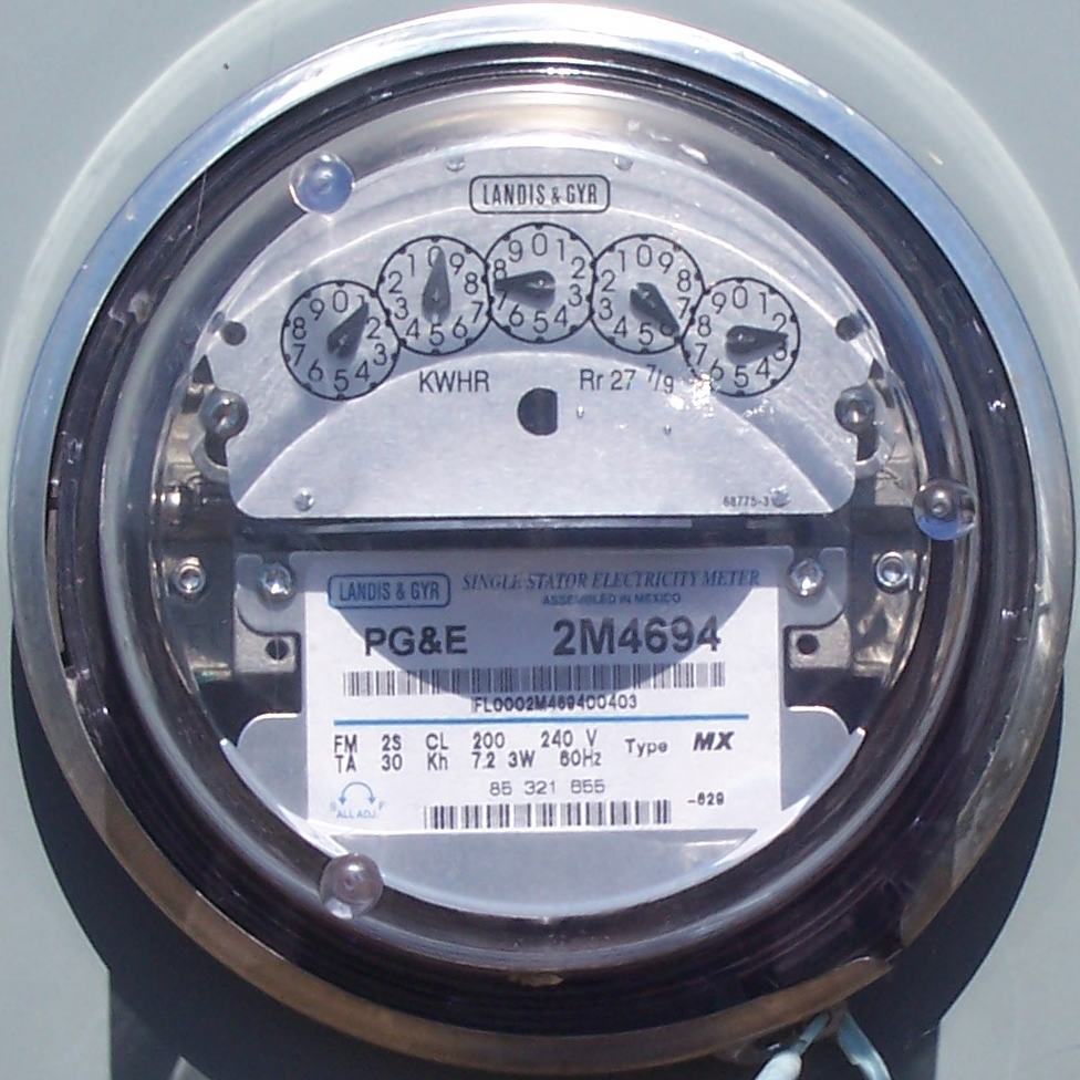 PG&E Meter on Angele Island.